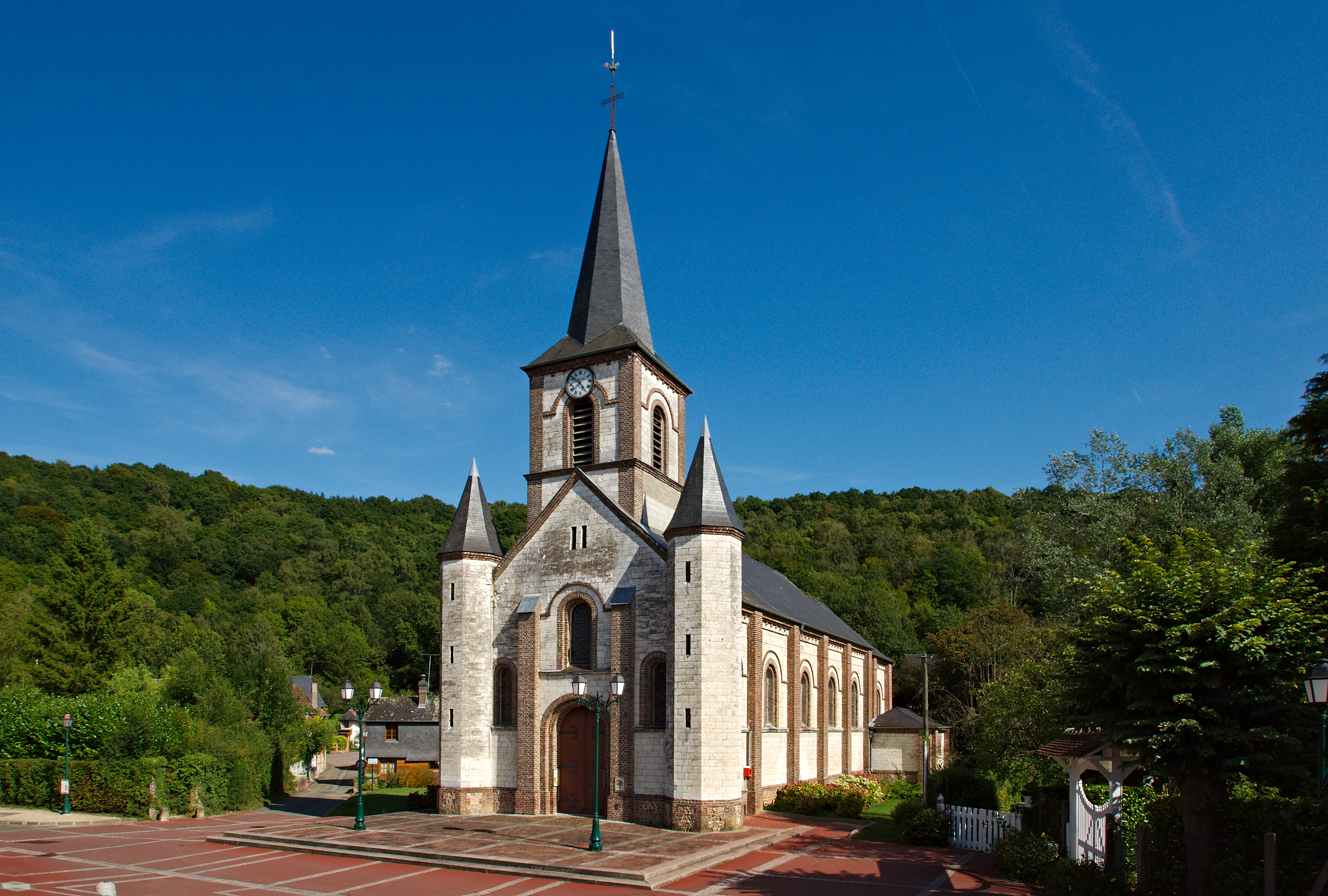 Église Saint-Martin de Saint-Martin-du-Vivier, rue de l’Ancien-Presbytère